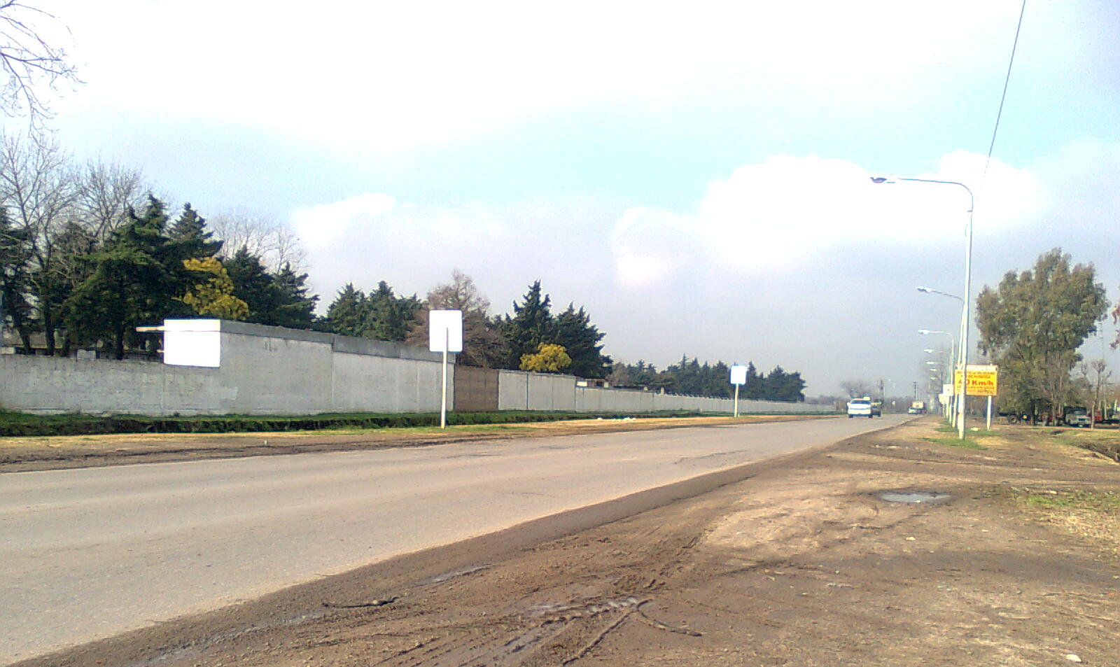 Montes de Oca (Ruta Provincial 1003) - Partido de Merlo. Del lado de la ruta desde el que se tomó la fotografía está la localidad de Pontevedra, y del lado de enfrente la localidad de Libertad.